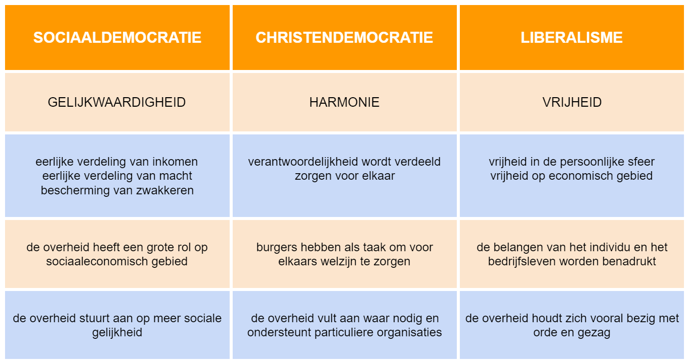 Politieke ideologieën kunnen in de regel onder één van deze politieke hoofdstromingen ingedeeld worden.